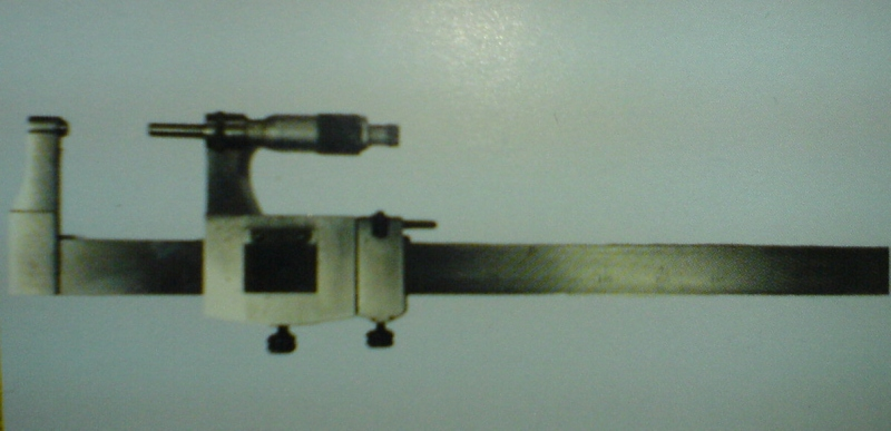 Производство СССР (1939г.)